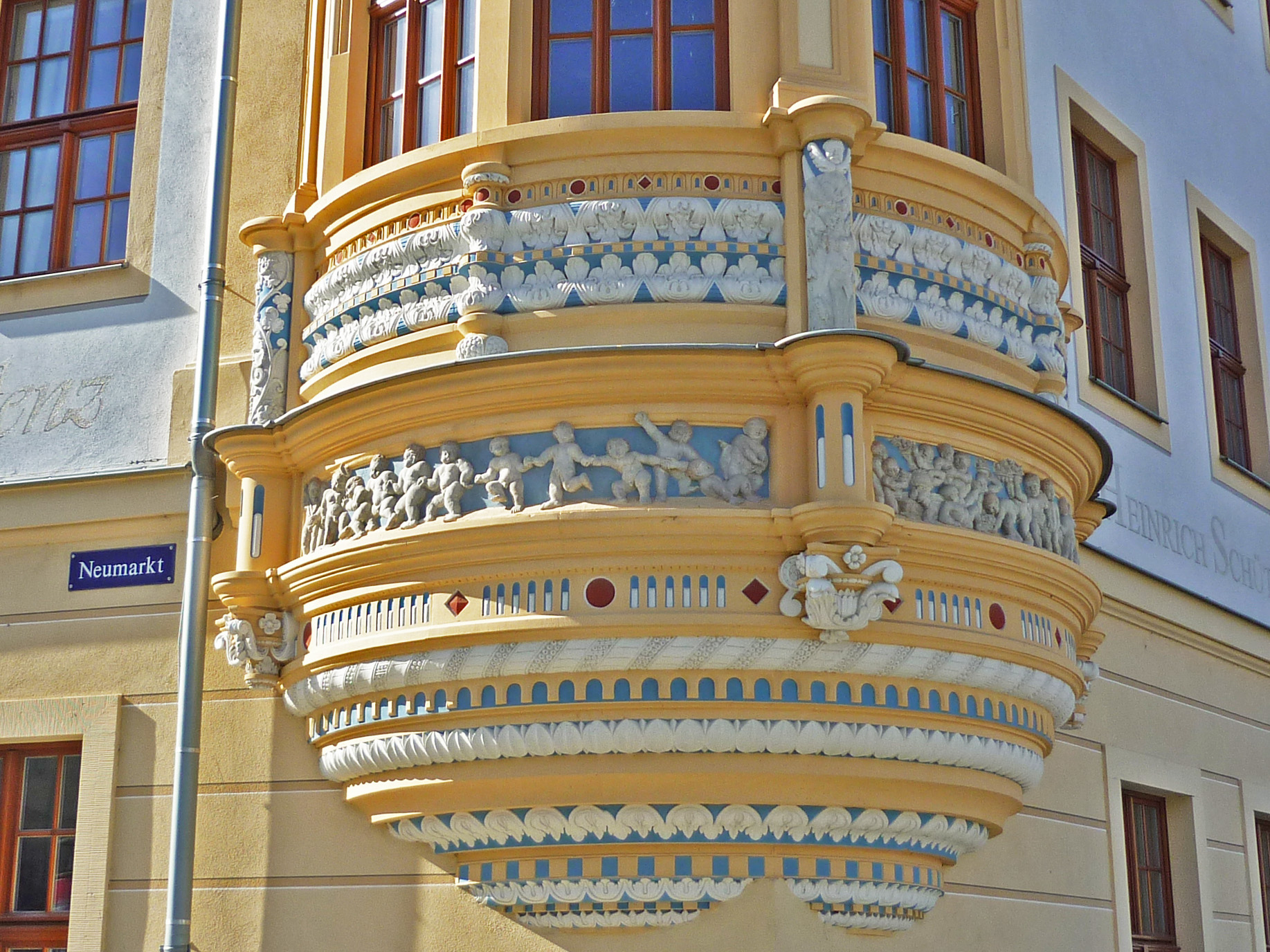 Kinderfries am Heinrich-Schütz-Haus in Dresden (Neumarkt)